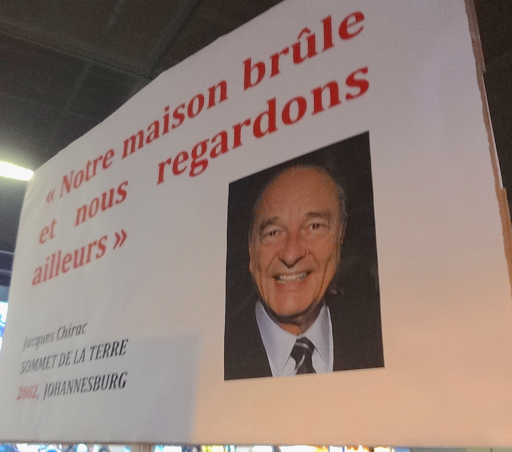 Manif climat à Berne 28 septembre 2019. Banderoles et slogans. Hall principal de la gare de Berne, autour du point de rencontre. « Notre maison brûle et nous regardons ailleurs. Jacques Chirac, Sommet de la terre, 2002, Johannesburg ».